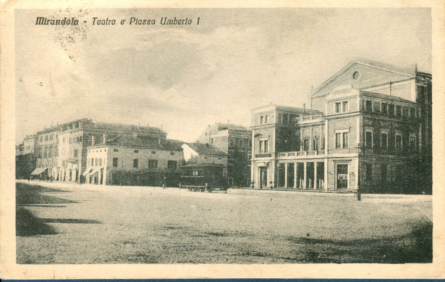 Mirandola - Teatro e Piazza Umberto I